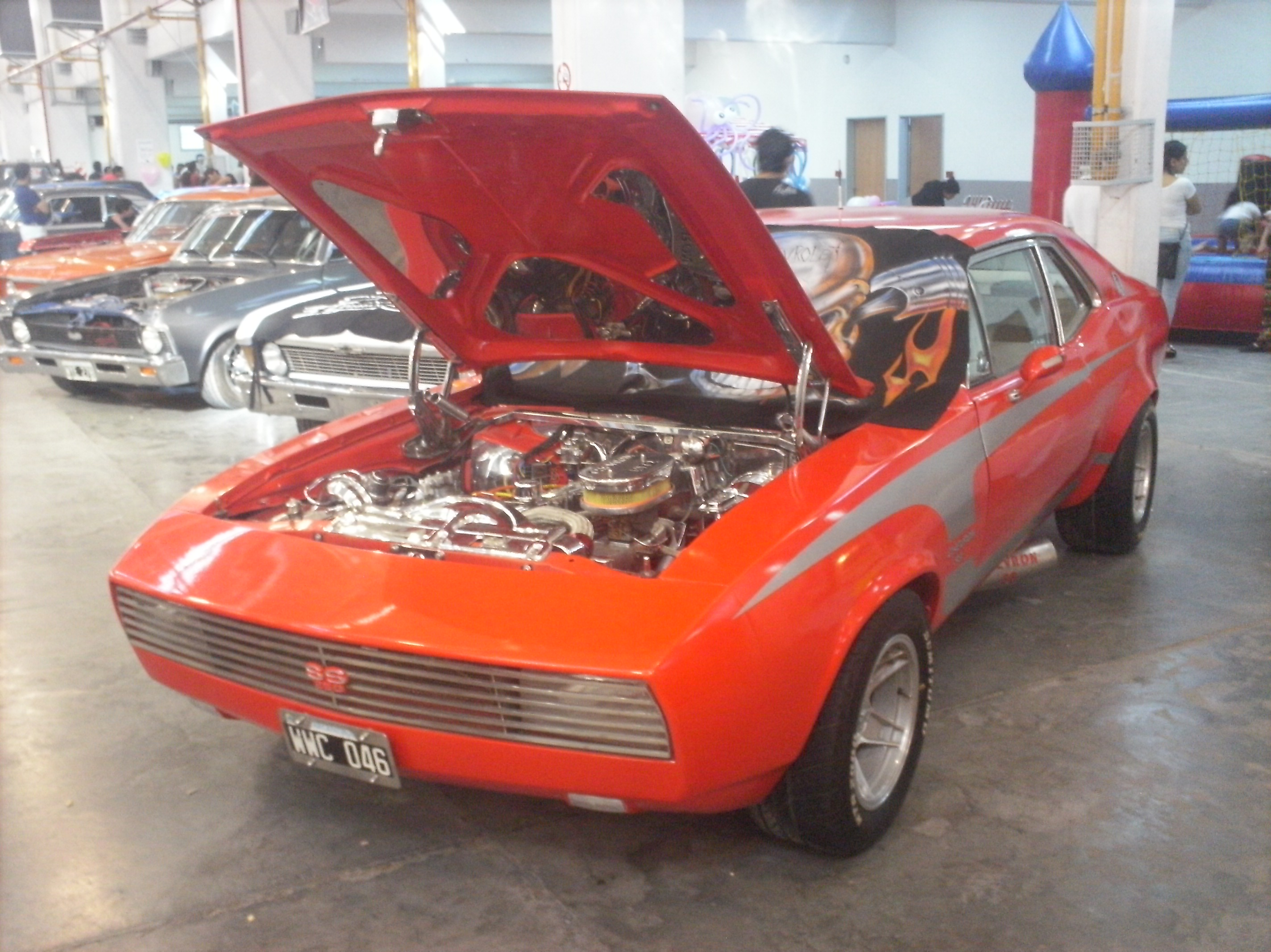 Coupe Chevron en exposición